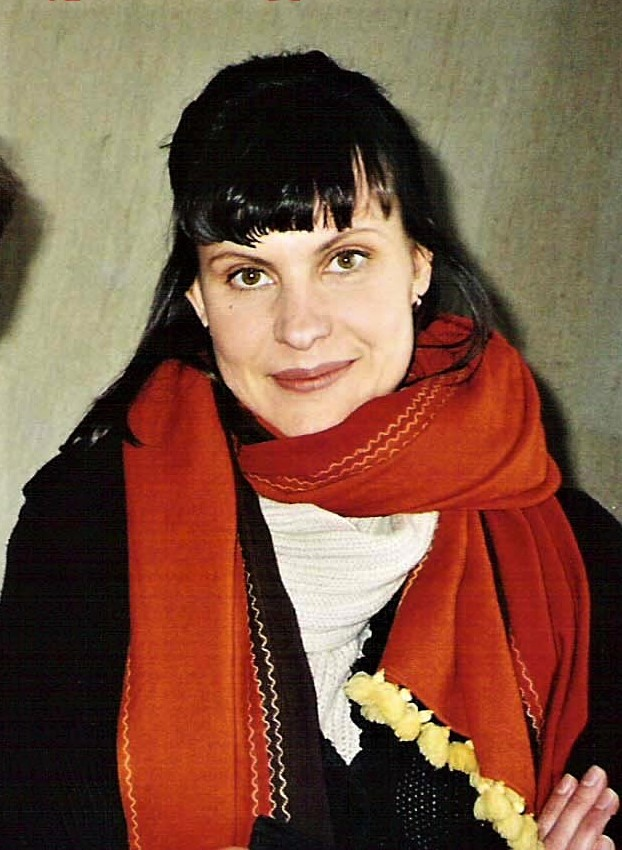 Laurence Bibot, "Bravo Martine" et "Miss B" entre autres.